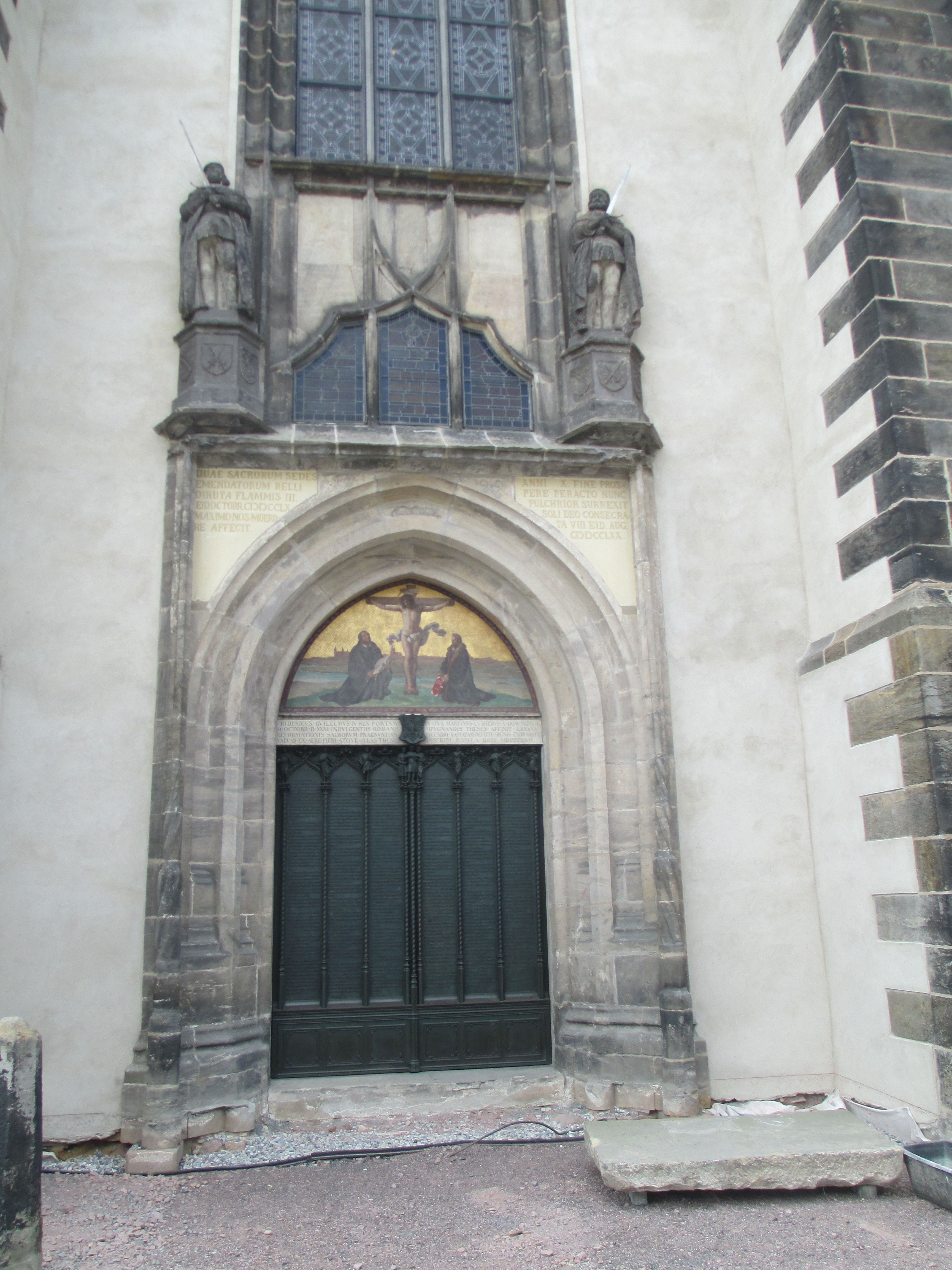 דלתות 95 התזות בכנסיית הטירה (כל הקדושים) בוויטנברג